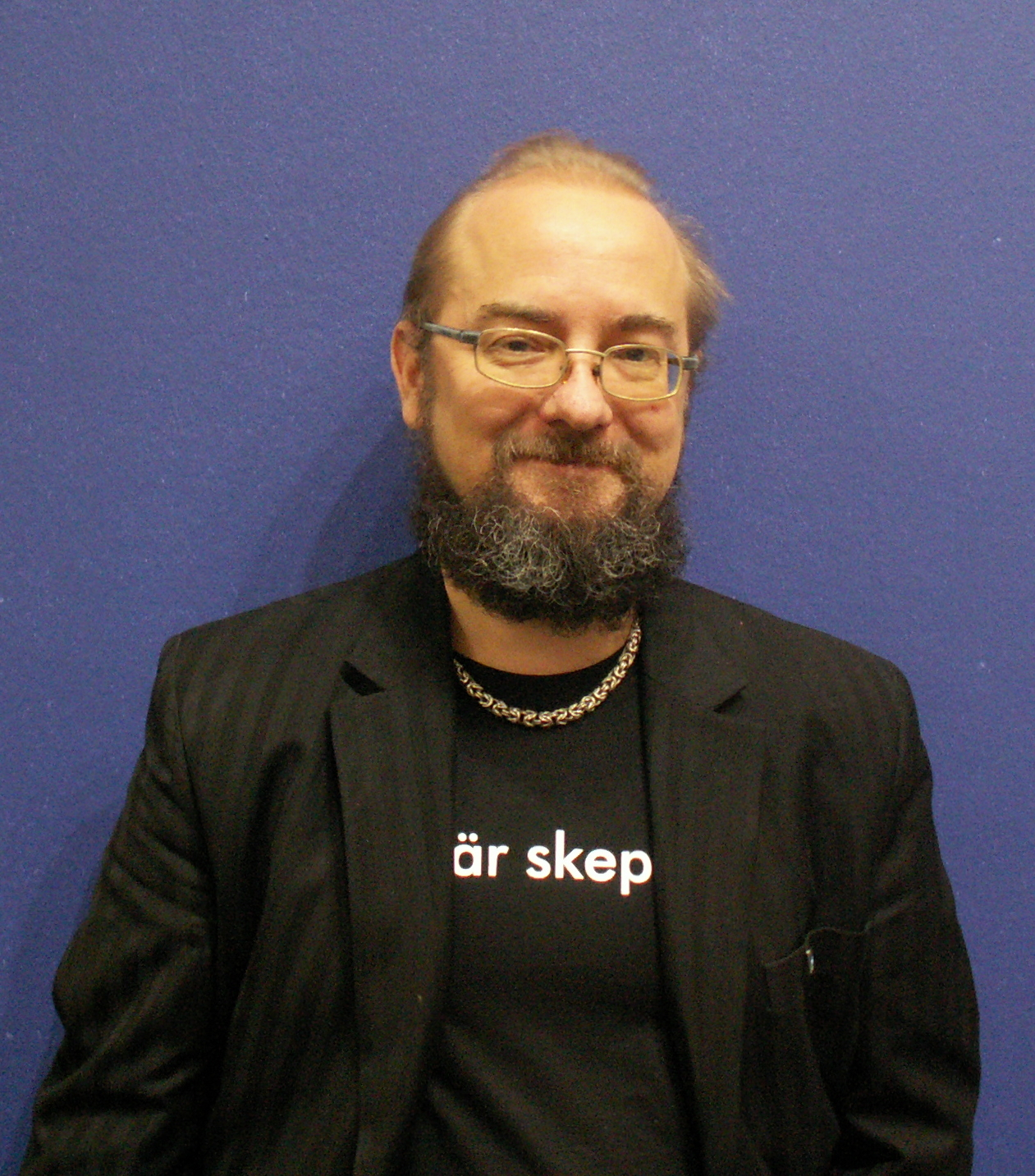 Peter Olausson.